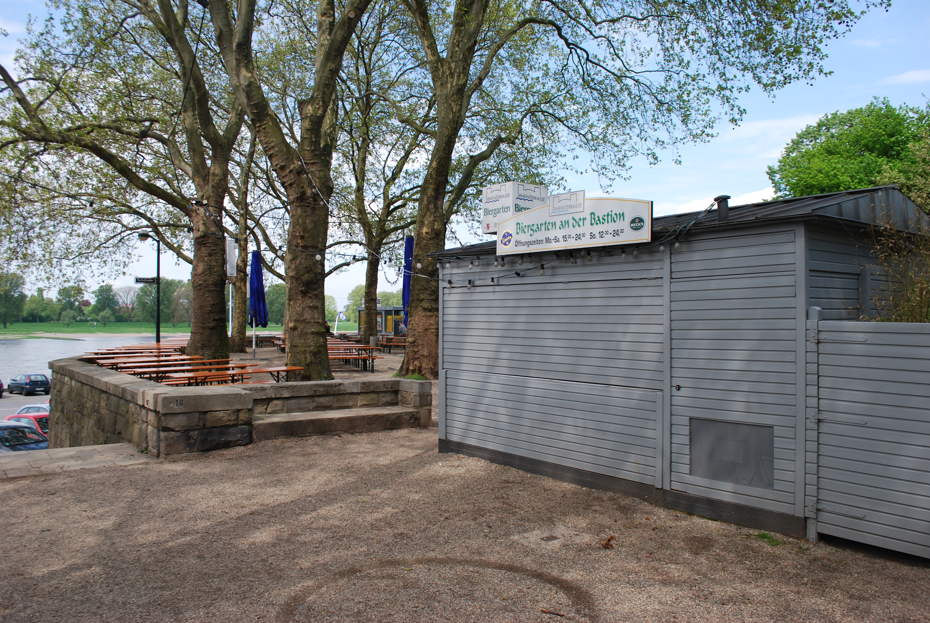 Vue d'un restaurant sur le bord du Rhin à Düsseldorf.